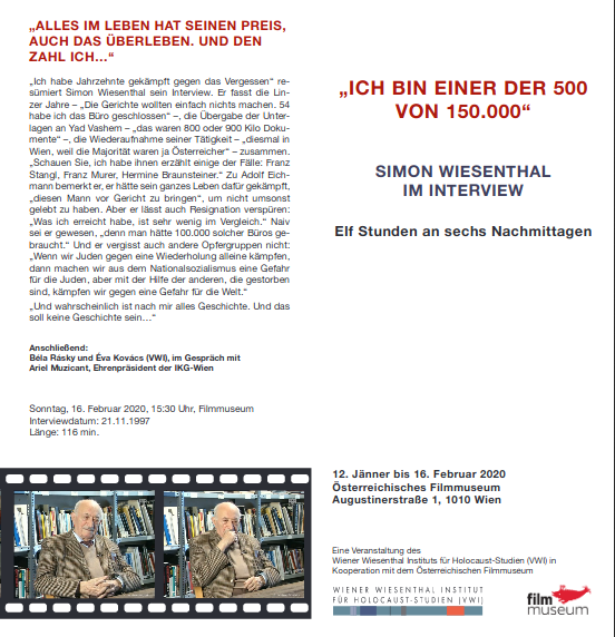 Titelseite der Einladung zur Vorführung des VHA-Interviews mit S. Wiesenthal, Wiener Wiesenthal Institut für Holocaust-Studien (VWI)